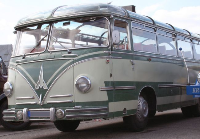 Magirus-Deutz Omnibus vom Typ O3500H